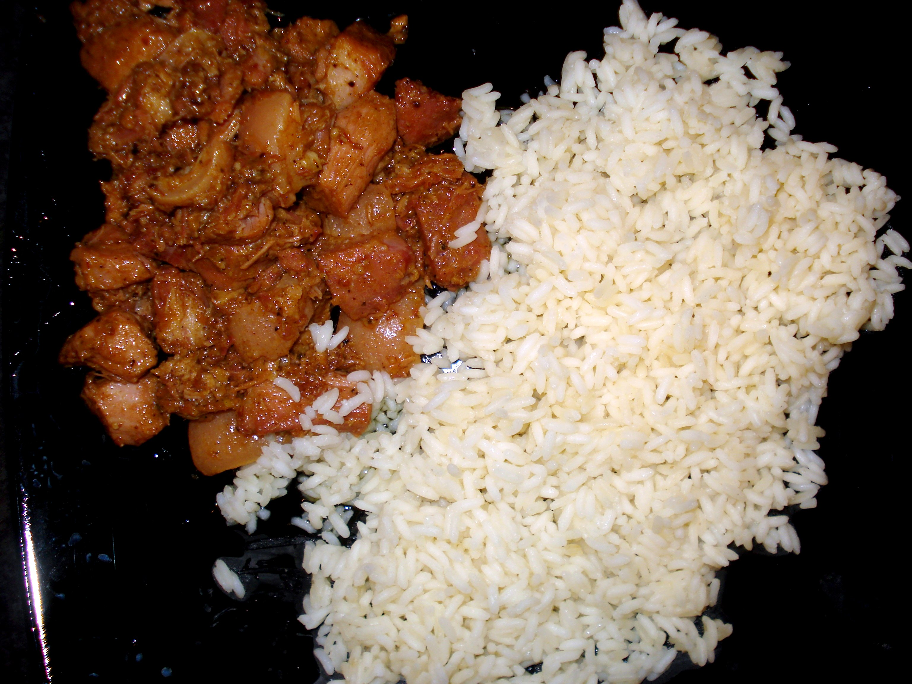 Τηγανιά, από Gammon (χοιρινό κρέας).